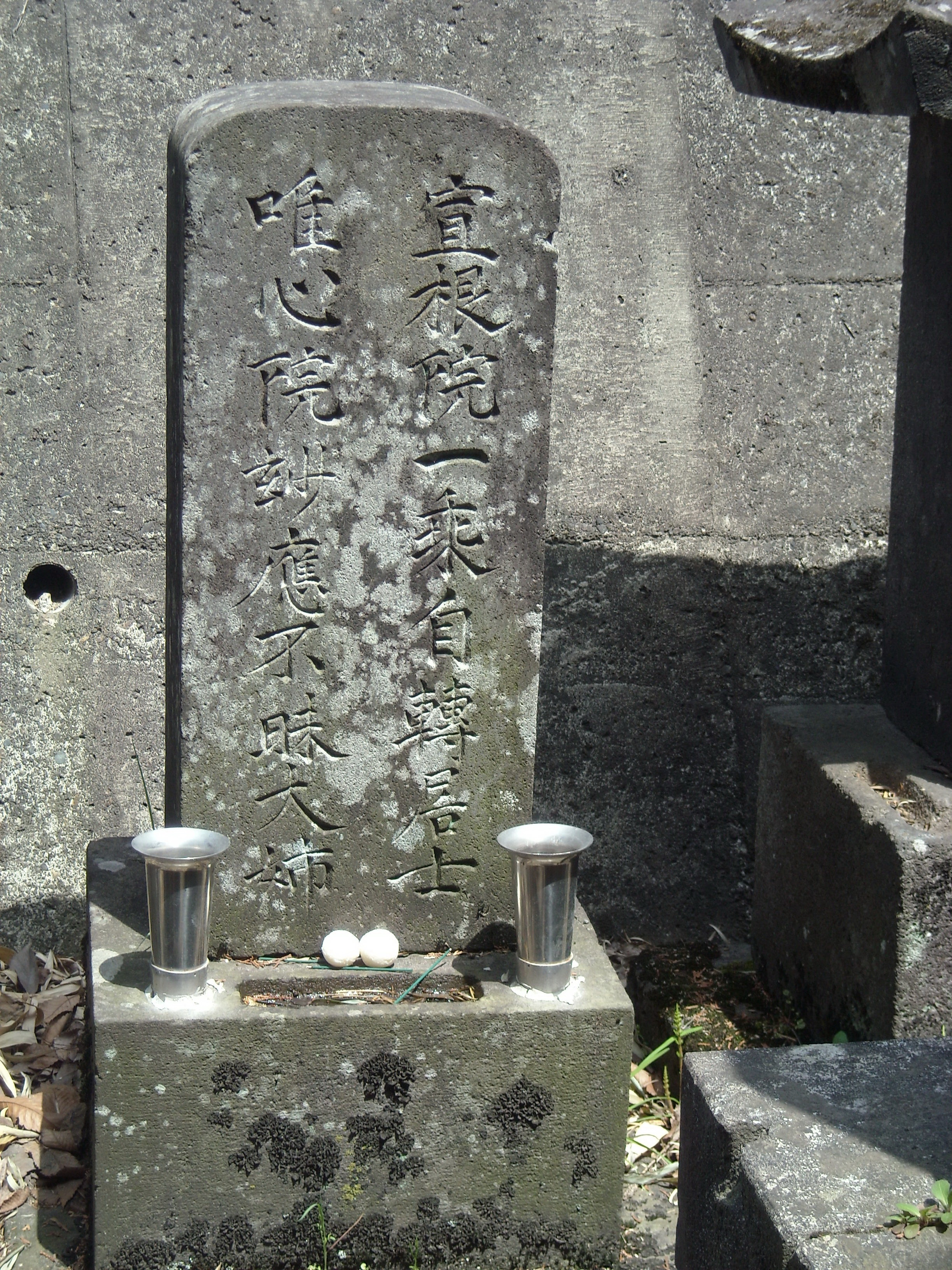 櫛淵宣根墓碑